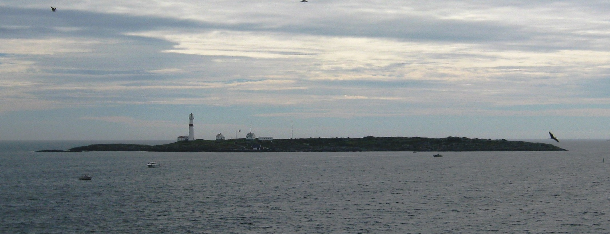 Store Torungen, Arendal Norge